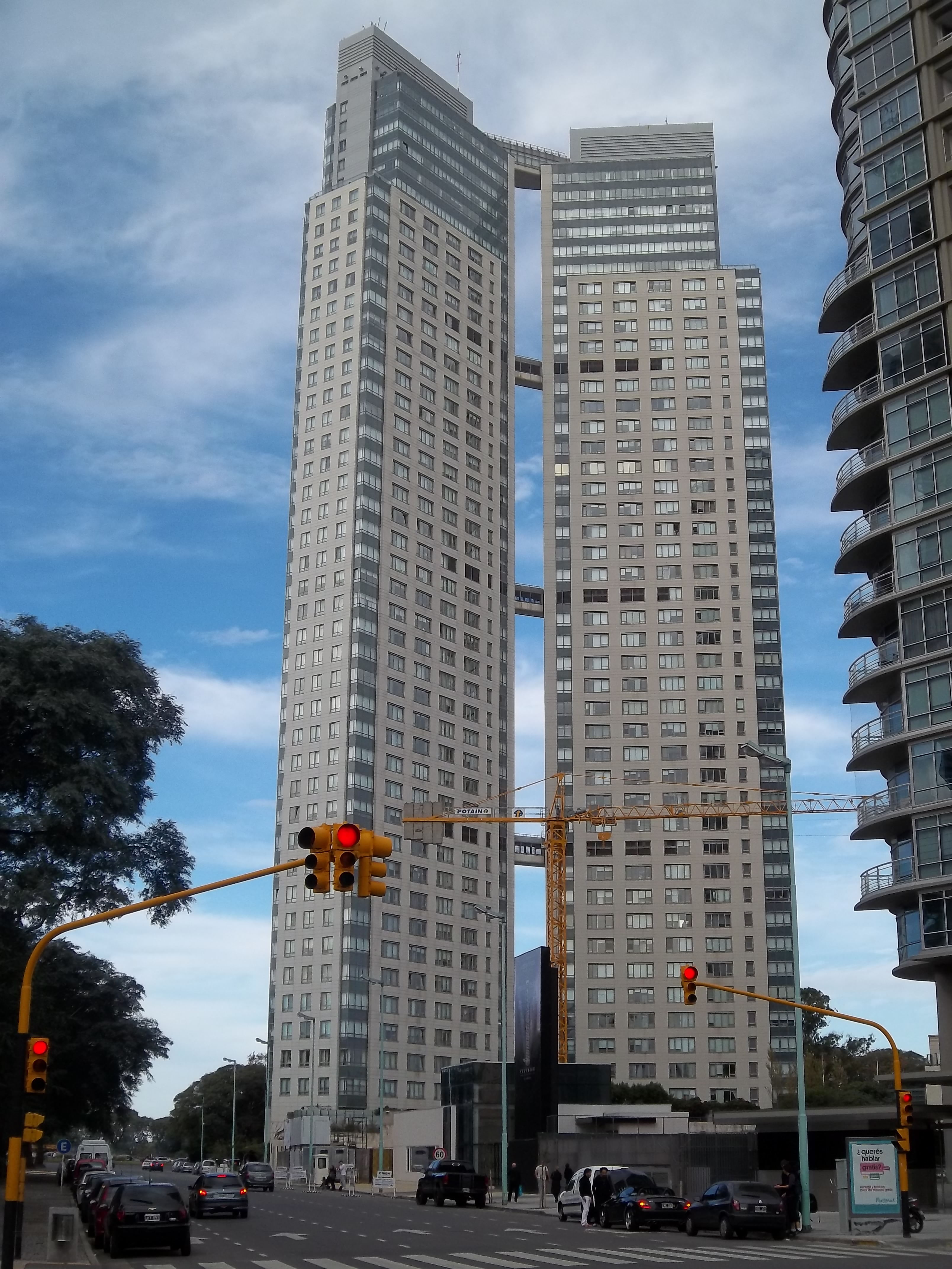 Torres El Faro en Puerto Madero, Buenos Aires, Argentina.